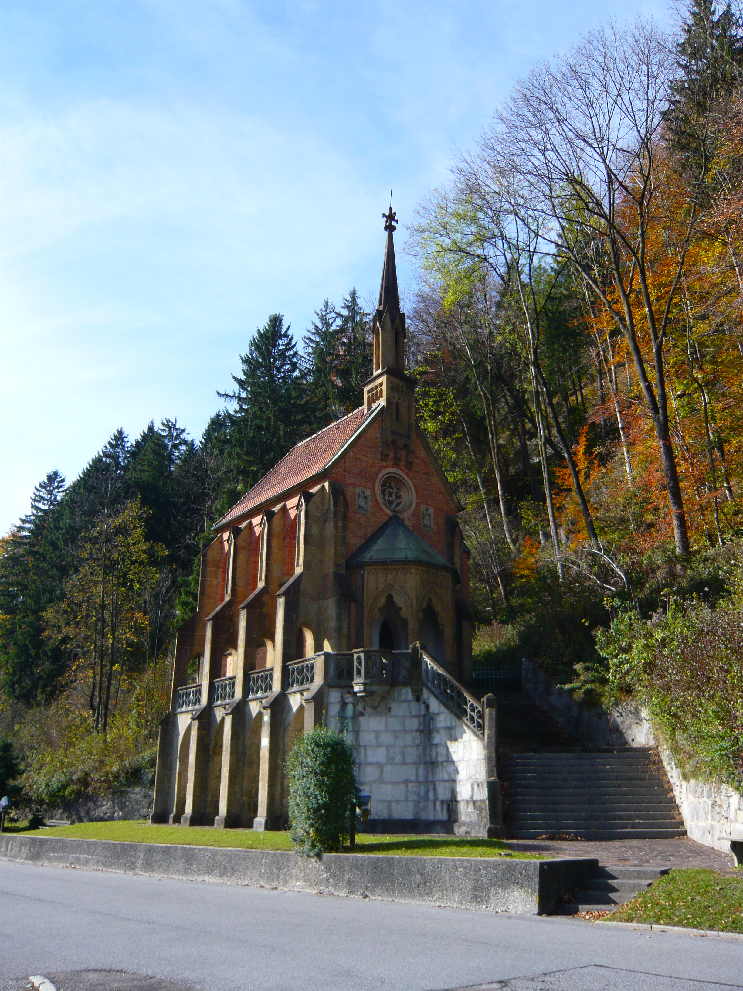 Kath. St. Otto-Kapelle - König-Otto-Straße 52, Kiefersfelden